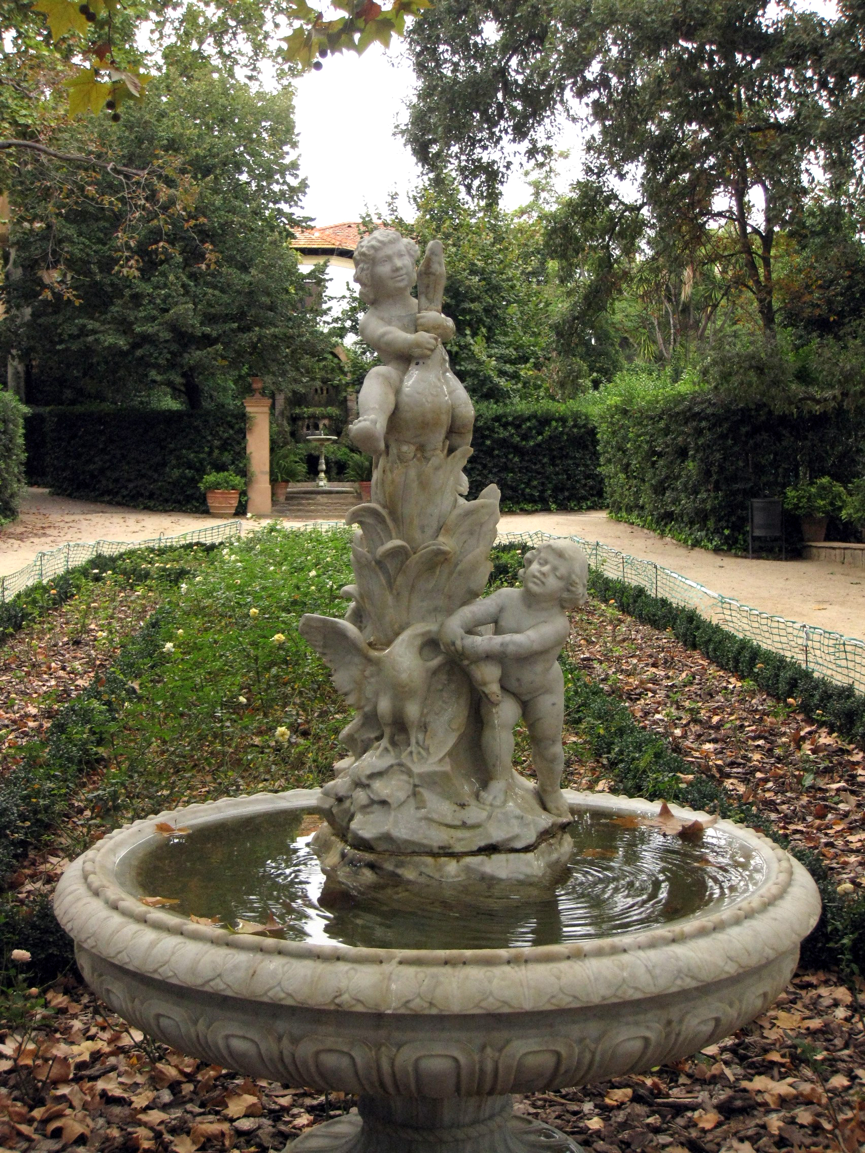 Les fonts de la Tamarita. Jardins de la Tamarita (Barcelona)